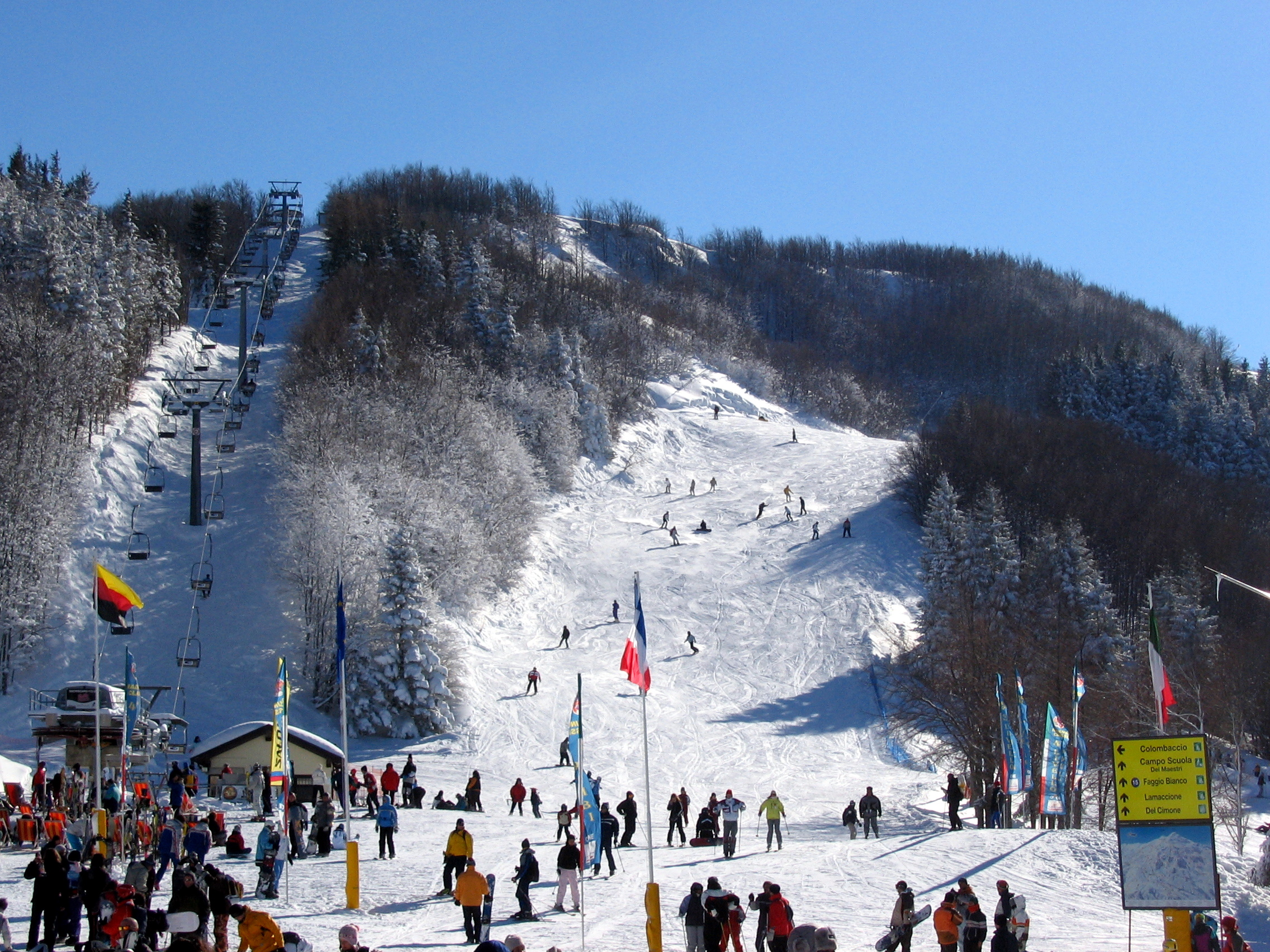 Monte Cimone, Appennini, Italy. Passo del lupo.